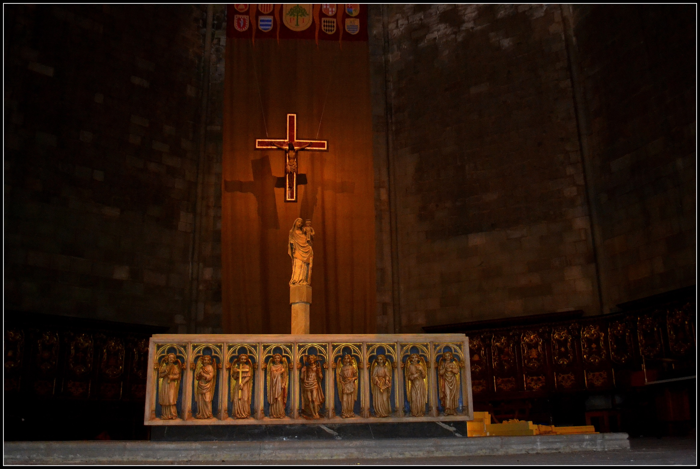 Santa Maria del Pi (Barcelona)